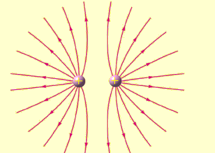 Representación de campo eléctrico producido por dos cargas